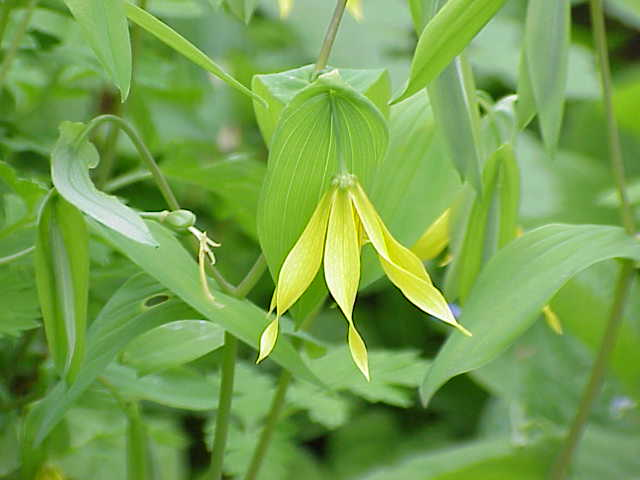 Species: Uvularia grandiflora Family: Liliaceae Image No. 2